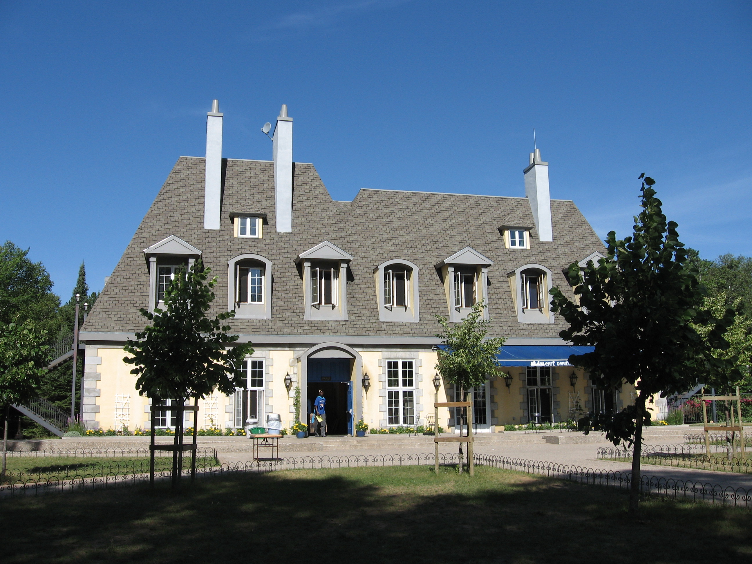 Paris, le bâtiment principale de Lac du Bois à Bemidji, MN. Photo prise par John Carroll/Jean Poirier en été 2006.